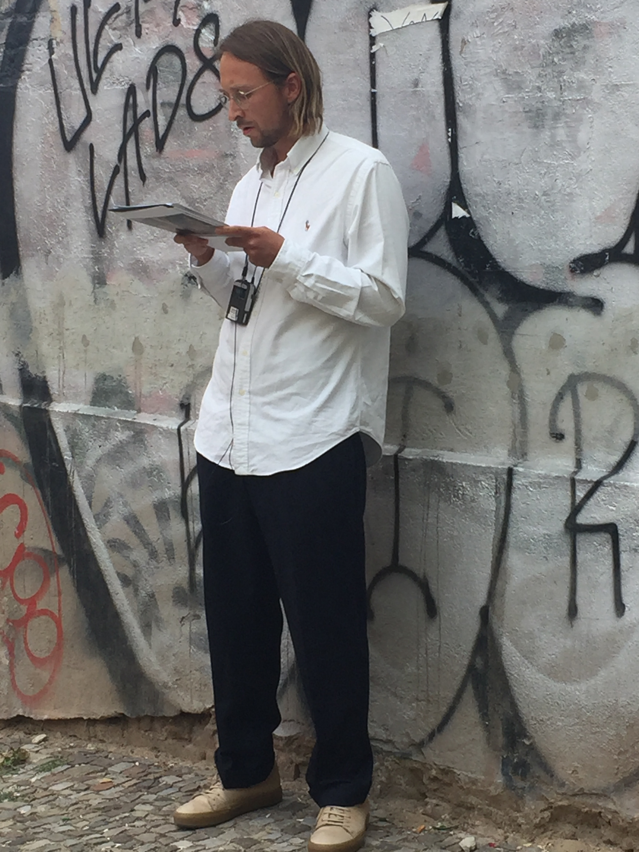 Franz Friedrich liest bei einem literarischen Spaziergang vor Studenten der Humboldt Universität in Berlin 2018